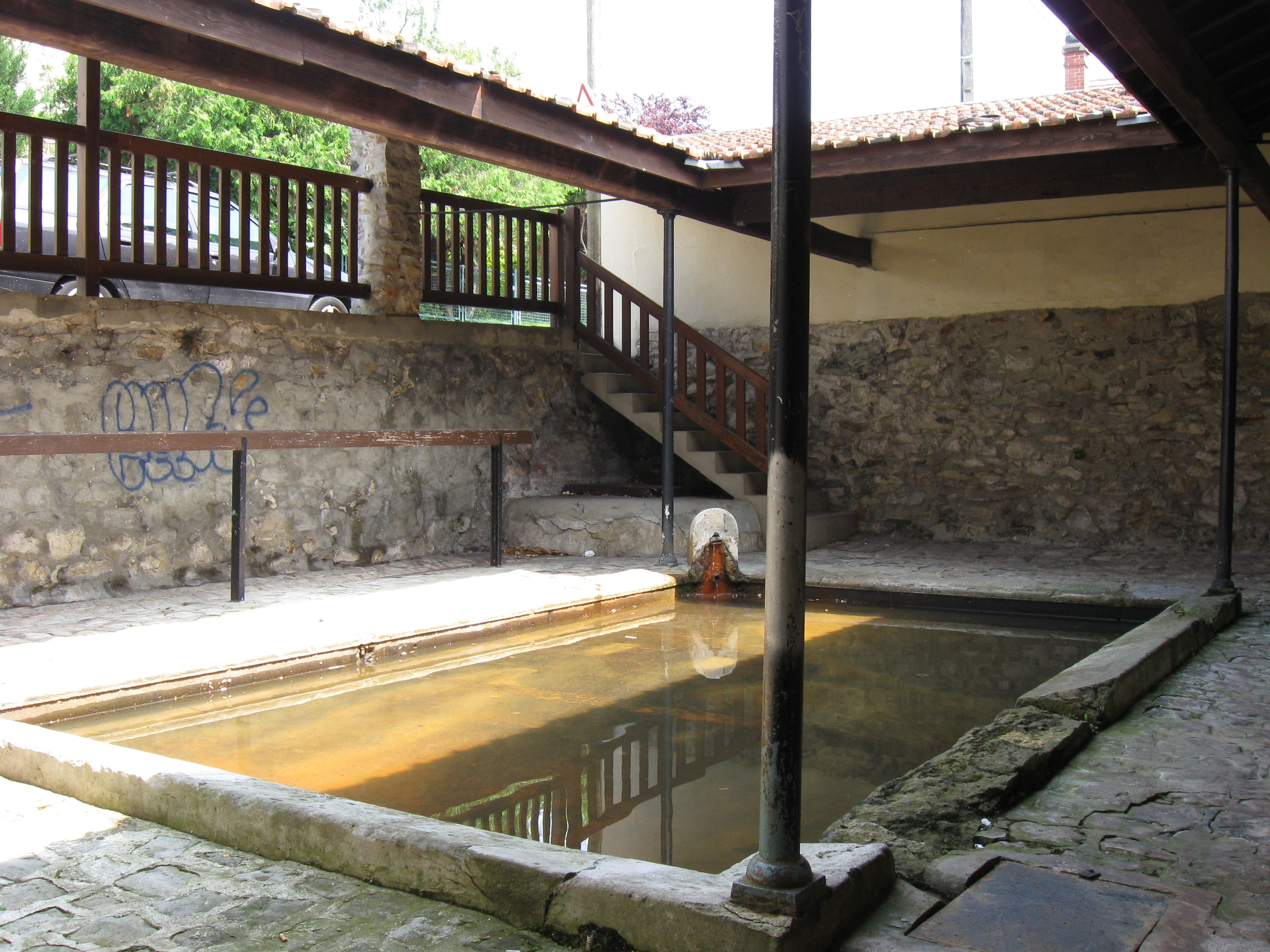 Lavoir de Torigny, XIXe siècle. (Département de Seine-et-Marne, région Île-de-France)